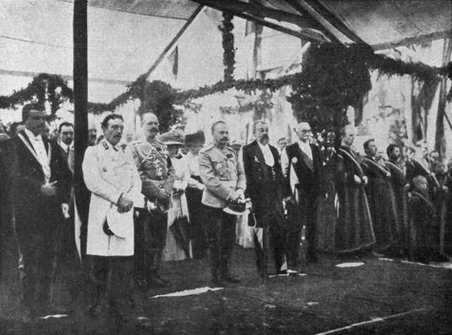 Молебен перед закладкой народного университета имени Шанявского в Москве, на Миусской площади. В первом ряду второй слева - городской голова Н. И. Гучков, затем московский губернатор В. Ф. Джунковский, московский градоначальник А. А. Адрианов, попечитель московского учебного округа Тихомиров, председатель совета университета имени Шанявского приват-доцент Н. В. Давыдов.